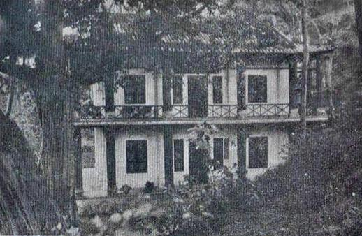 原学海堂启秀楼，1920年代改为粤秀楼，后毁于战火